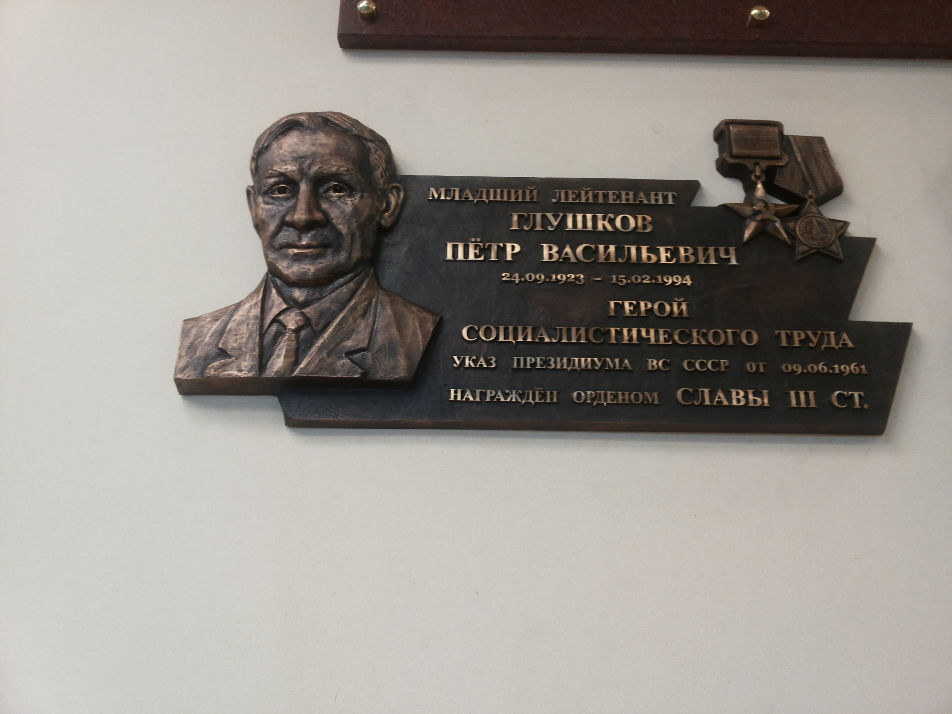 Музей военной техники «Боевая слава Урала»